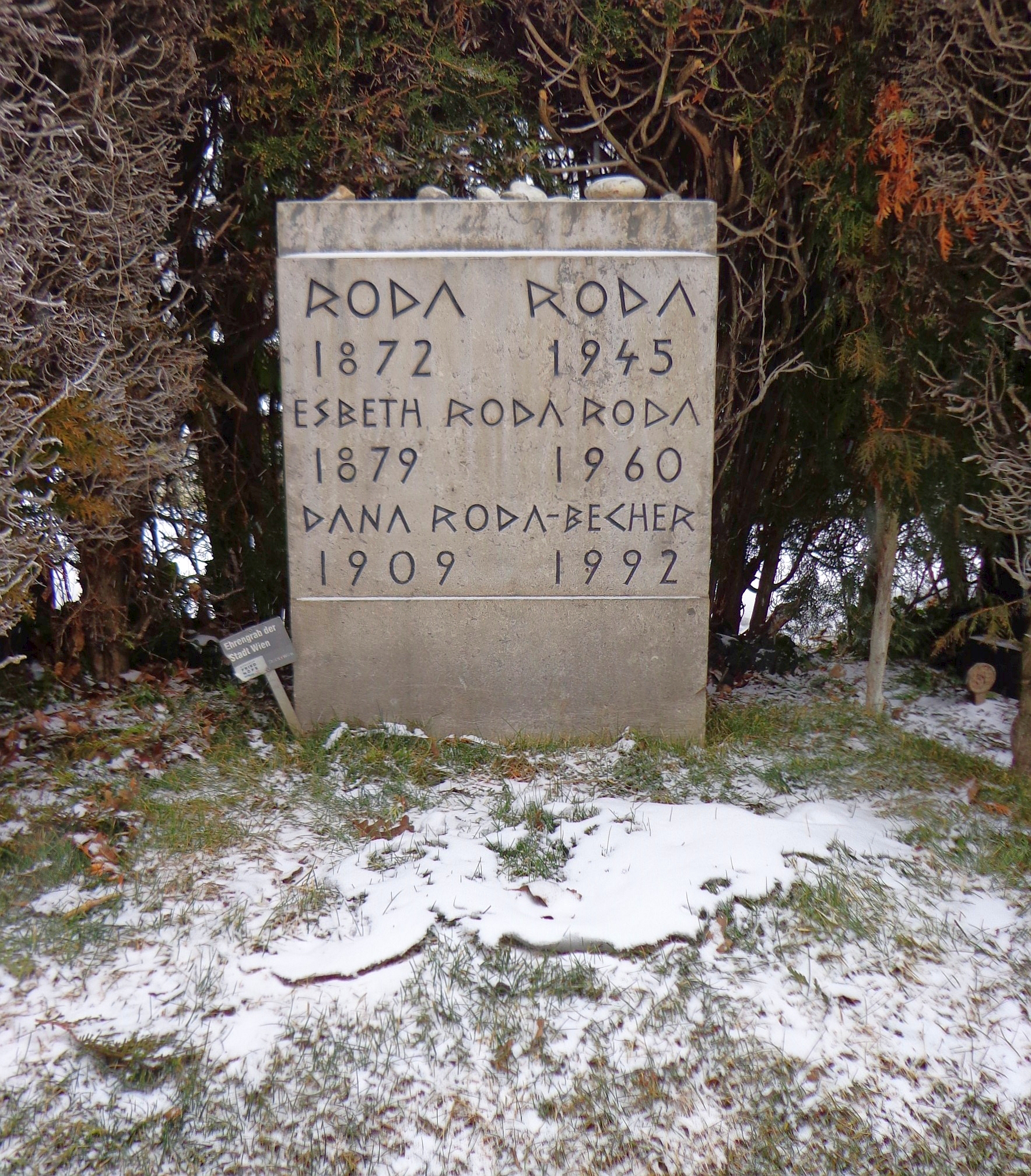 Feuerhalle Simmering - Urnenhain, ehrenhalber gewidmetes Urnengrab des Schriftstellers Alexander Roda Roda (Abteilung 2, Ring 1, Gruppe 2, Nummer 31) mit Grabmonument von Fritz Wotruba.